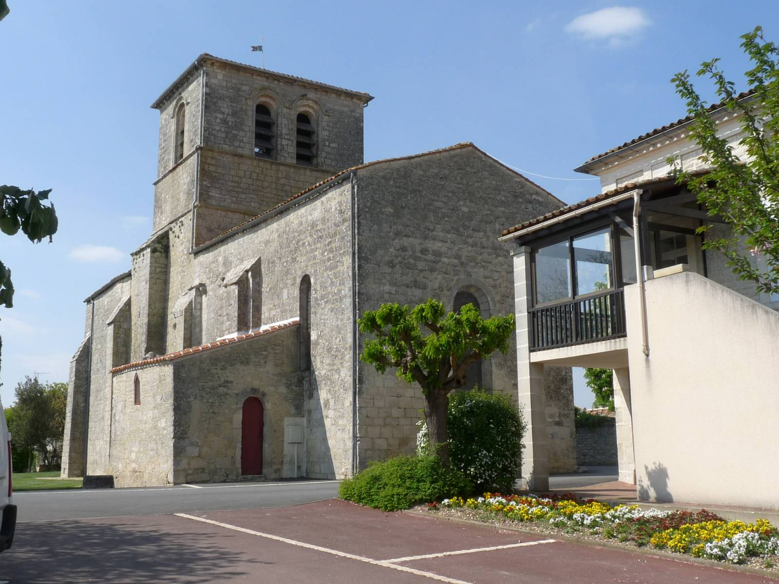 église de Foussignac, Charente, France